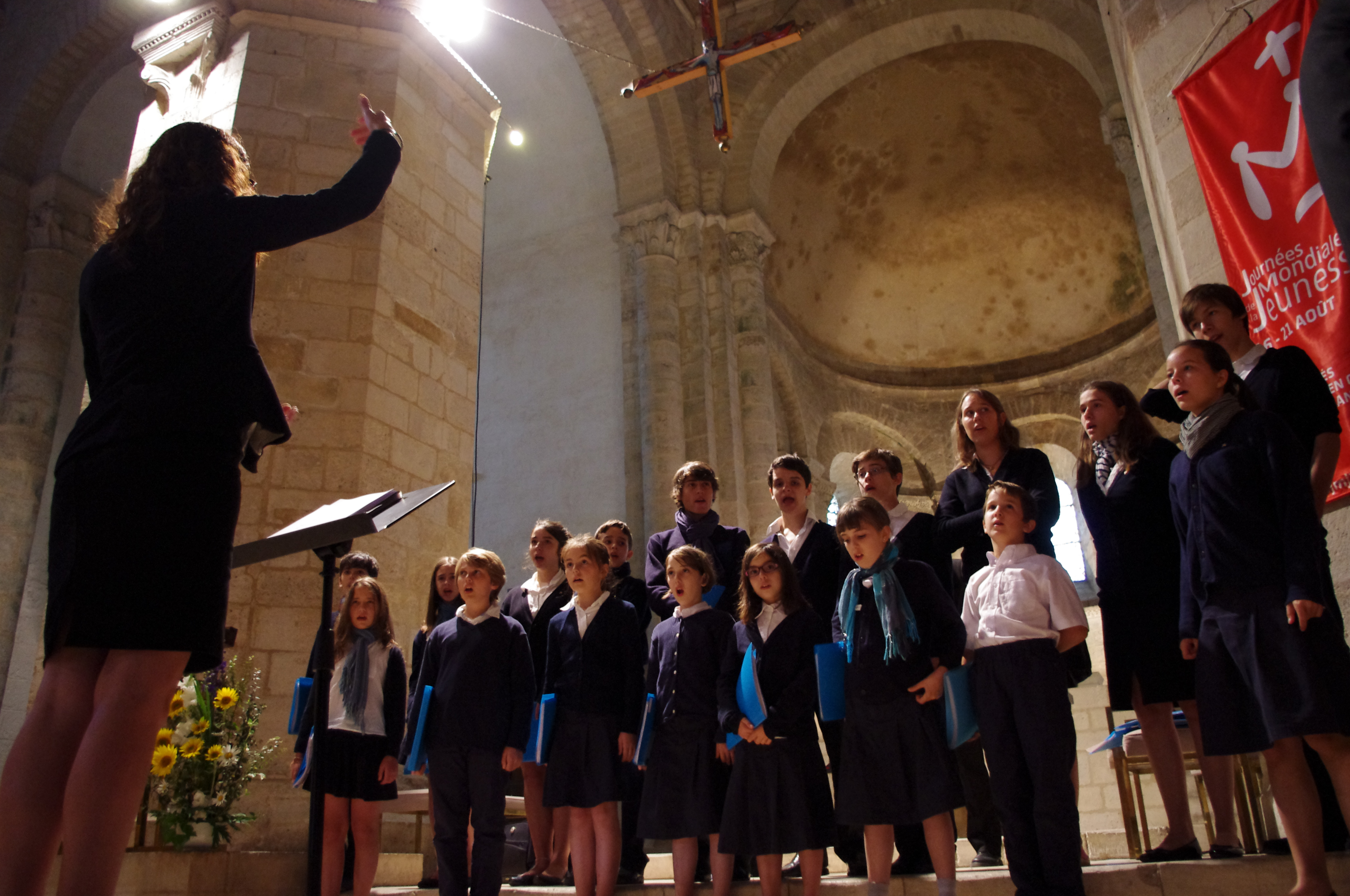 Les répétitions des Petits Chanteurs de Passy avant le concert dans l'église Notre-Dame de Surgères en 2011.